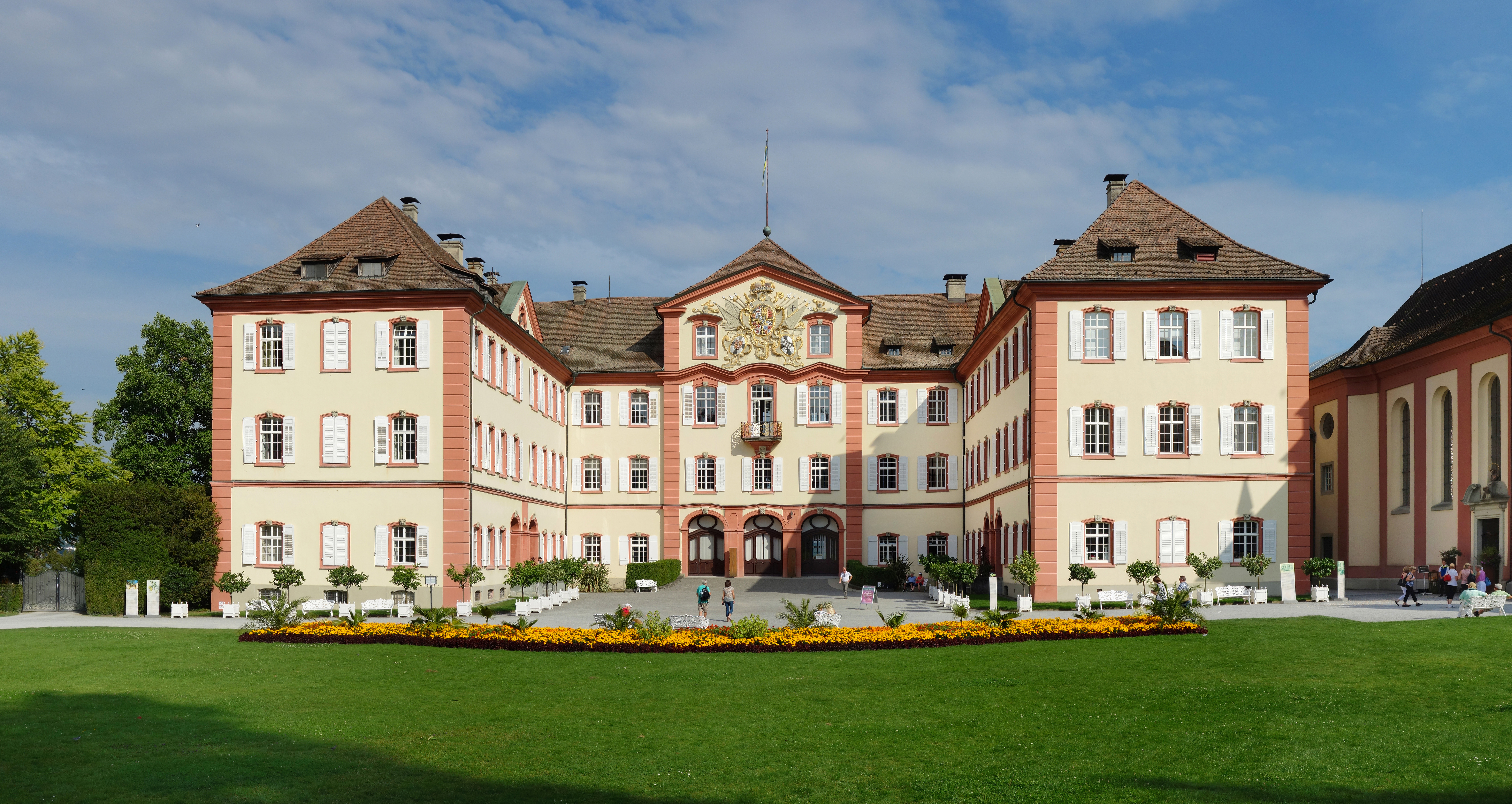 Das Schloss auf der Insel Mainau wurde nach den Entwürfen von Johann Caspar Bagnato und unter seiner Bauleitung 1739 begonnen und nach siebenjähriger Bauzeit vollendet. Das Schloss ist bis heute Wohnsitz der Adelsfamilie Bernadotte. Diese Datei wurde mit Hugin erstellt.